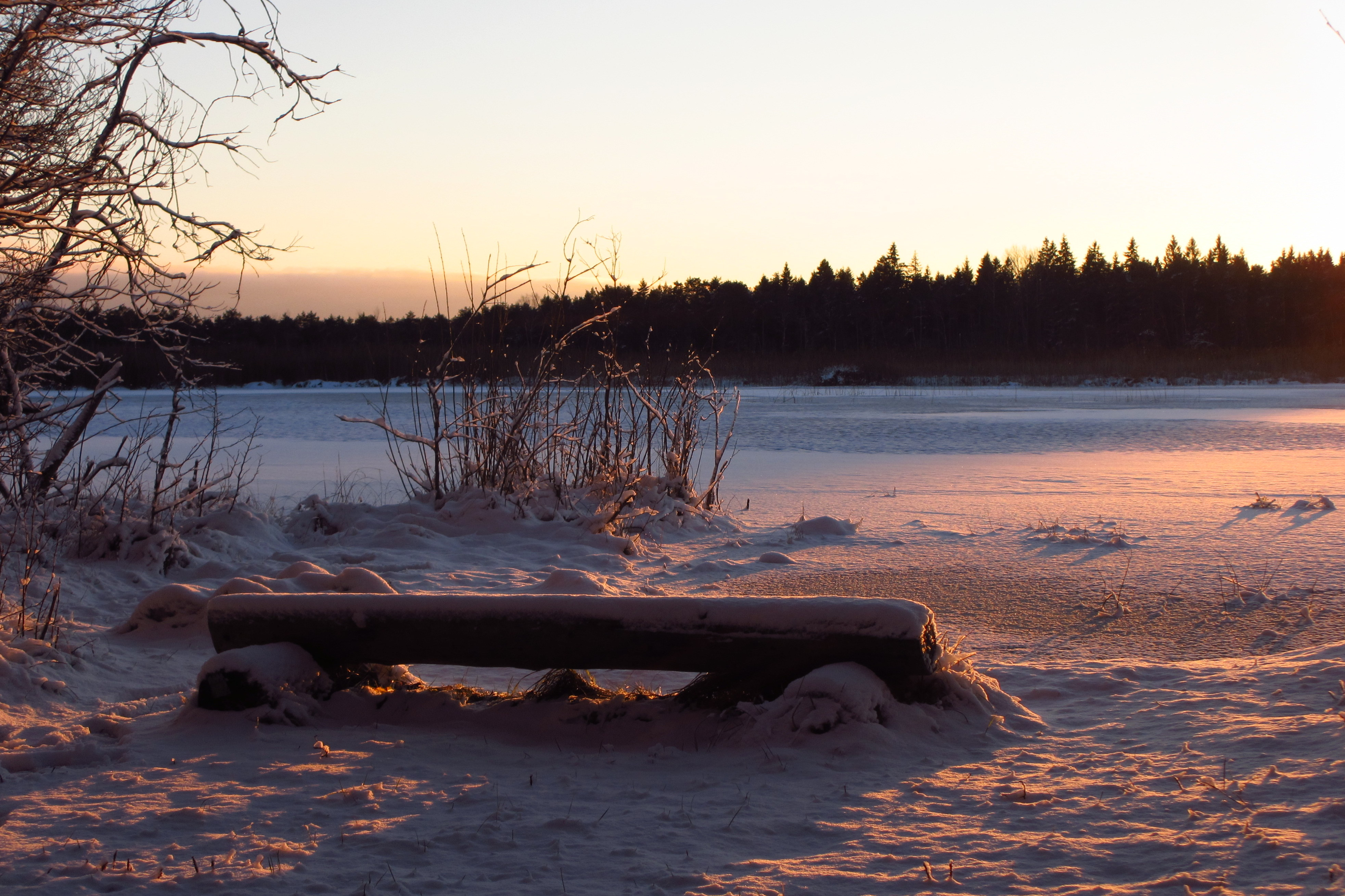 Ruila looduskaitseala